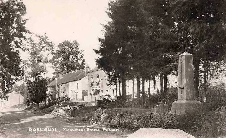 Stèle marquant le lieu du décès au combat du Lieutenant Ernest Psichari à Rossignol (Luxbg belge)